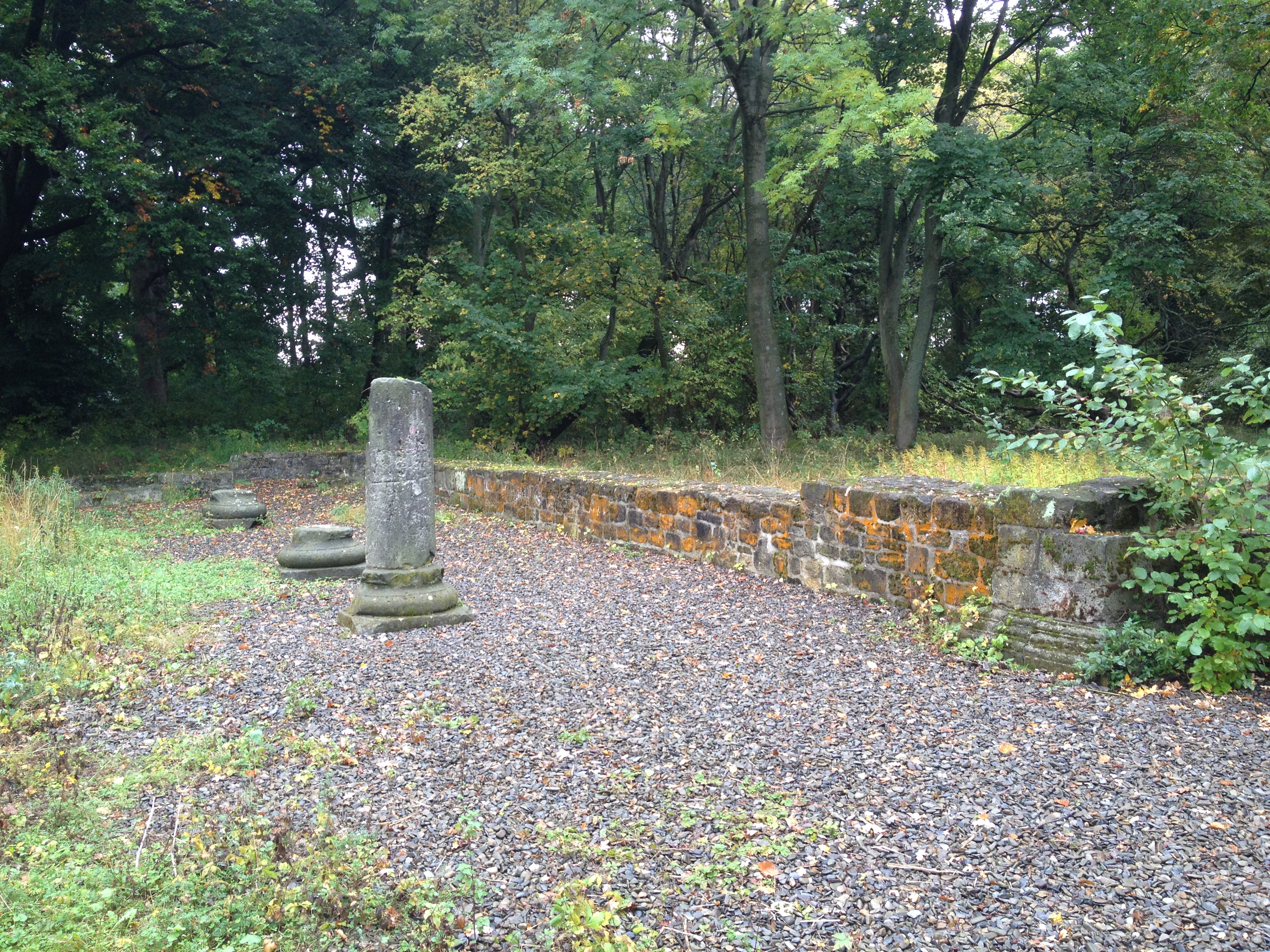 Stiftsruine St. Peter, Goslar, südliches Seitenschiff